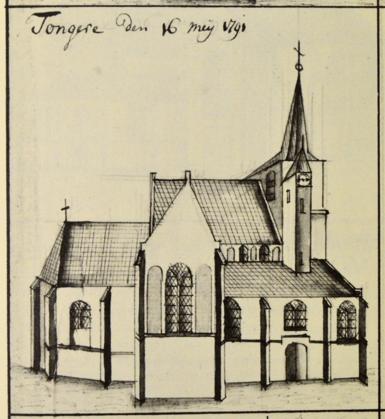 Voormalige Sint-Martinuskerk te Tongelre, gemeente Eindhoven (gesloopt 1891)